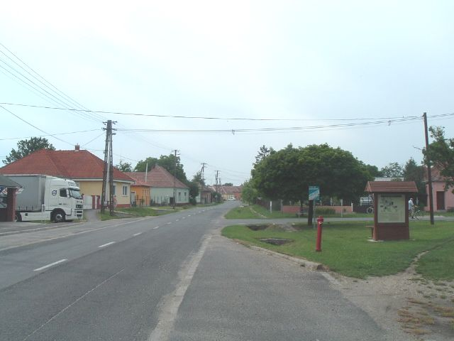 Street in Salköveskút, Hungary